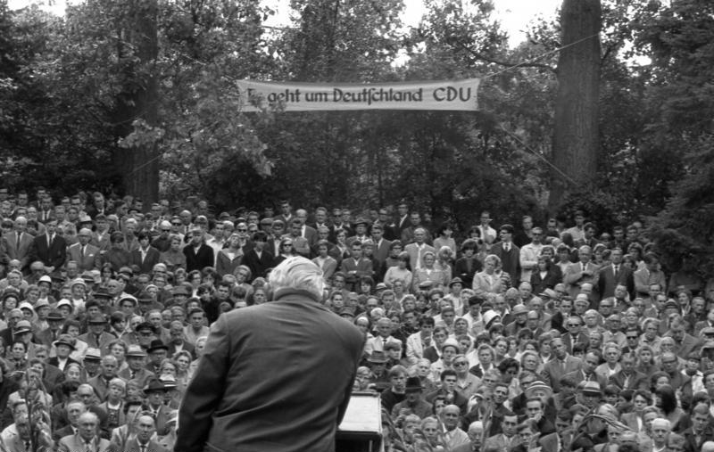 11.8.1965 Bundeskanzler Ludwig Erhard auf Wahlreise Neumünster-Lübeck